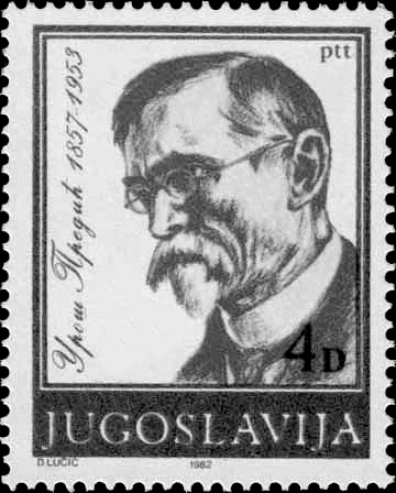 Uroš Predić, self-portrait